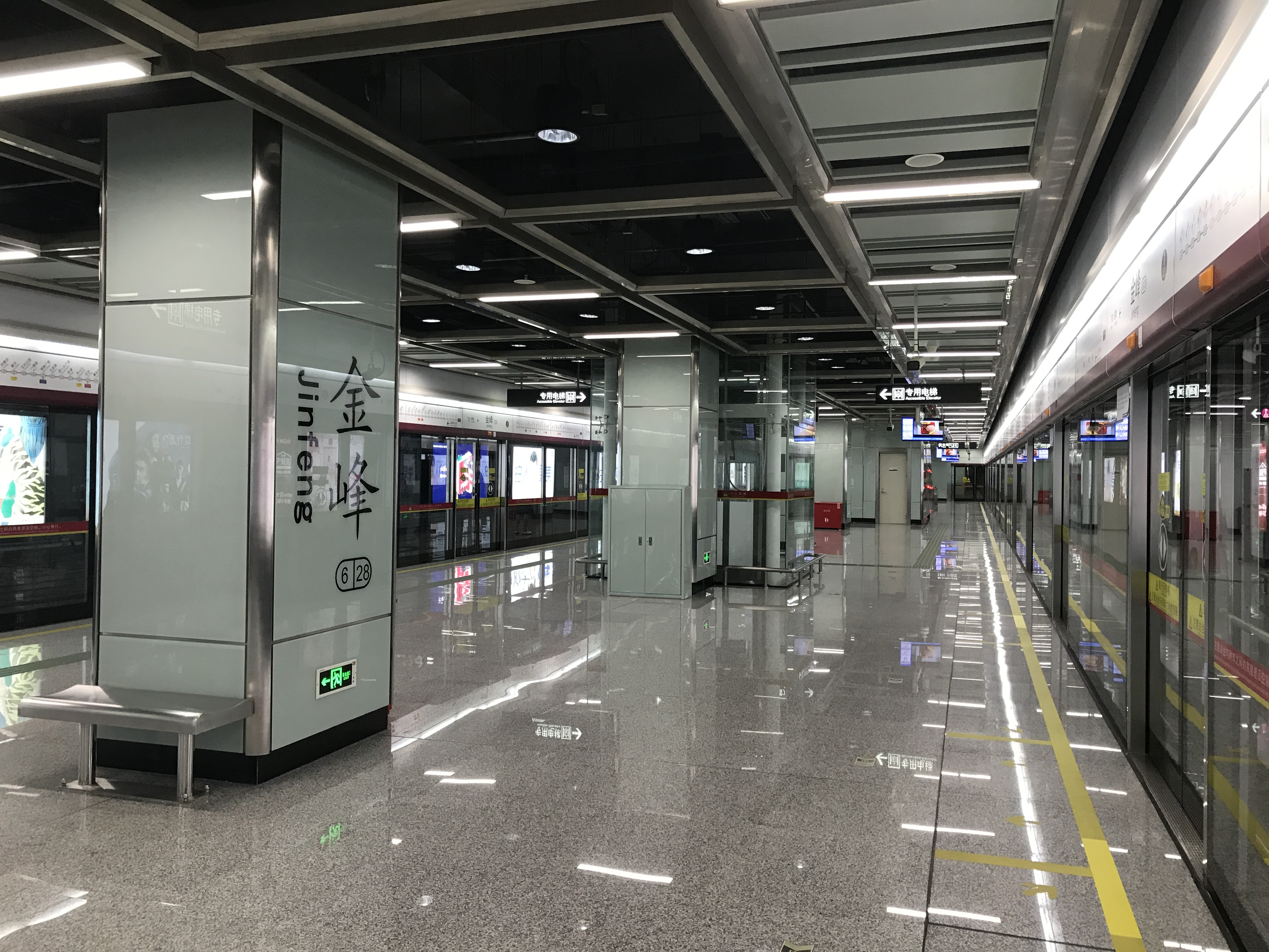 广州地铁金峰站